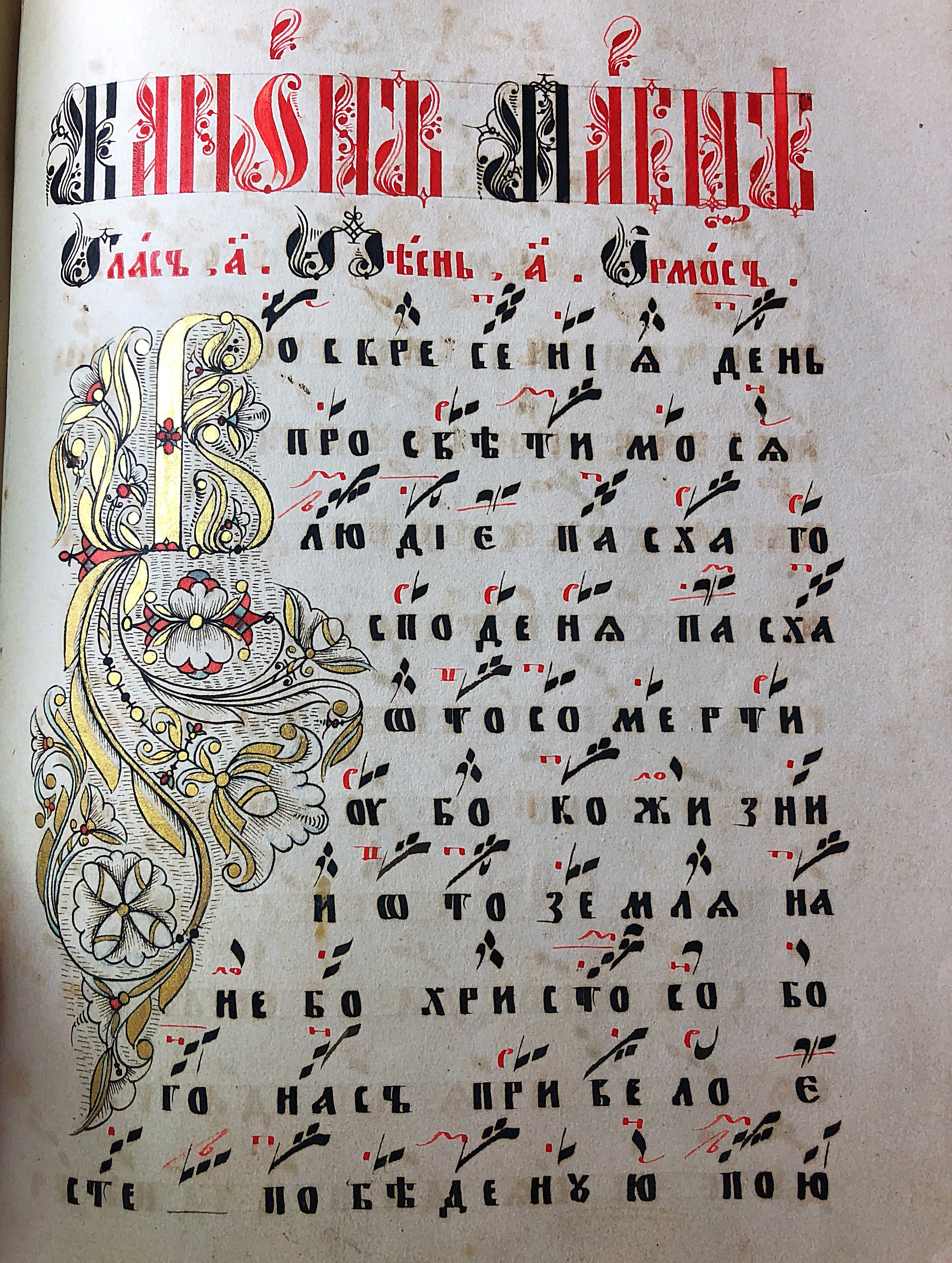 Канон Пасхе (Поморская рукопись, 19 век; частное собрание)